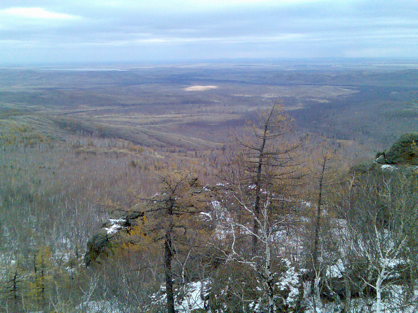 Вид в сторону Кужаново